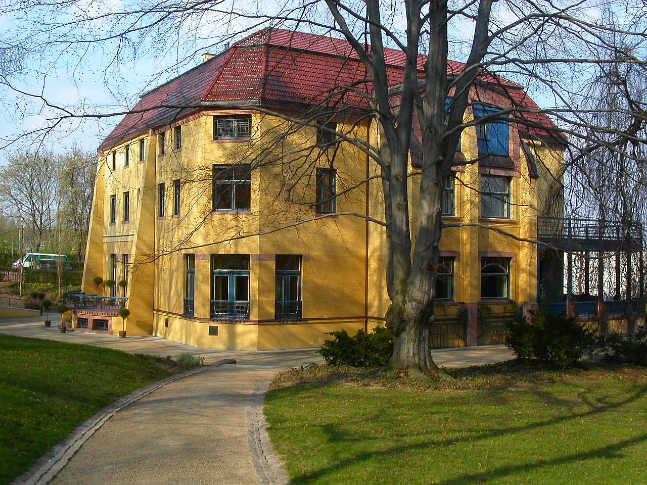 Villa Esche Chemnitz von Henry von de Velde